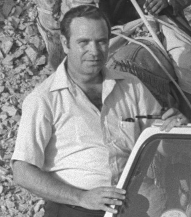 Depicted person: Gideon Patt – Israeli politician